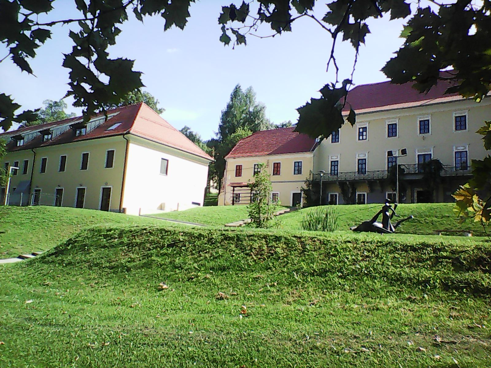 dvorec Trebnik, Slovenske Konjice